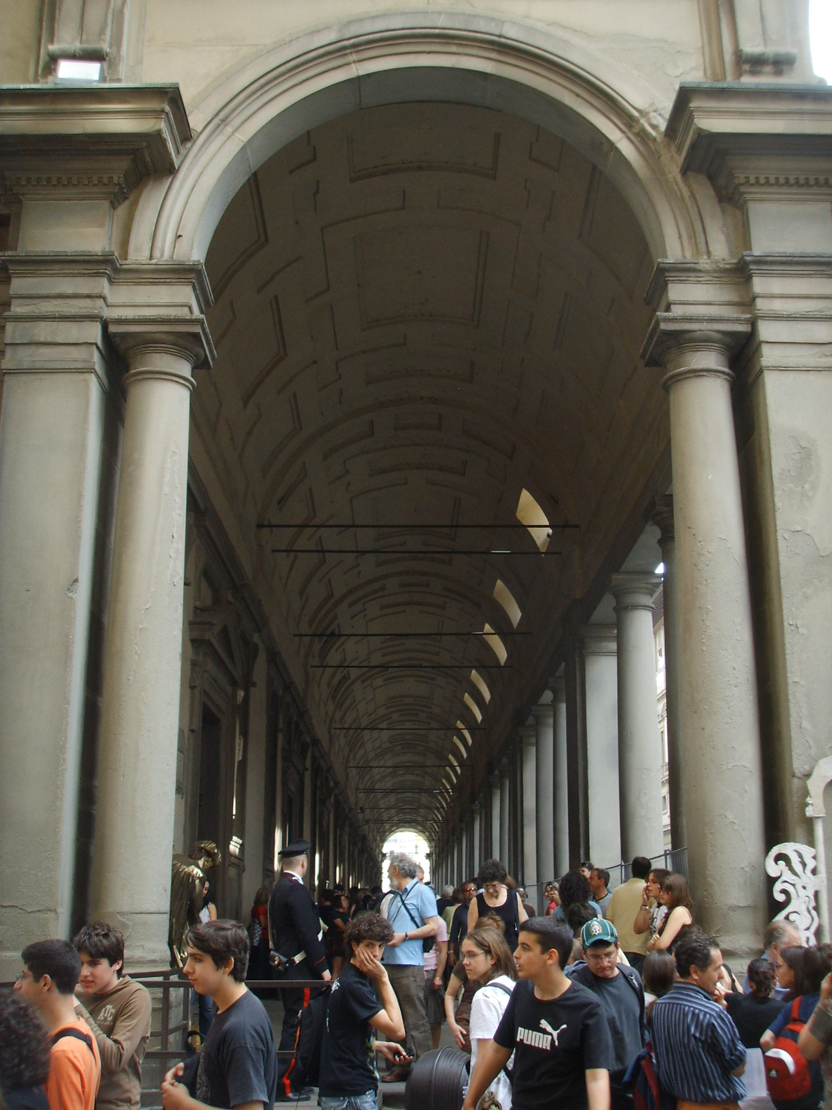 Portico degli Uffizi